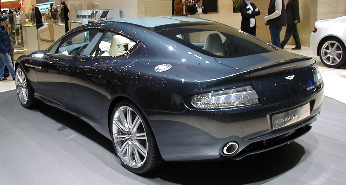 Ich habe dieses Foto selbst erstellt am Automobilsalon in Genf (2006)!